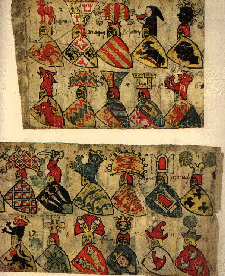 Zürcher Wappenrolle, Pergamentstreifen I Rückseite. 2. Hälfte VIII REGENSPVRG Regensburg, BistumIX BASEL Basel, BistumX MVRBACH Murbach, KlosterXI OWE Reichenau, KlosterXII WI.. Wien XIII PASSOW Passau, BistumXIV CONSTENZ Konstanz, Bistum XXII FRISINGEN Freising, BistumXXIII CHIEMSE Chiemsee, BistumXXIV VLMViNZ Olmütz, BistumXXV SEGGOW Seckau, BistumXXVI GVRGE Gurk, BistumXXVII BRIHSEN Brixen, BistumXXVIII PFALLENZ VOM RIN Pfalzgraf am Rhein